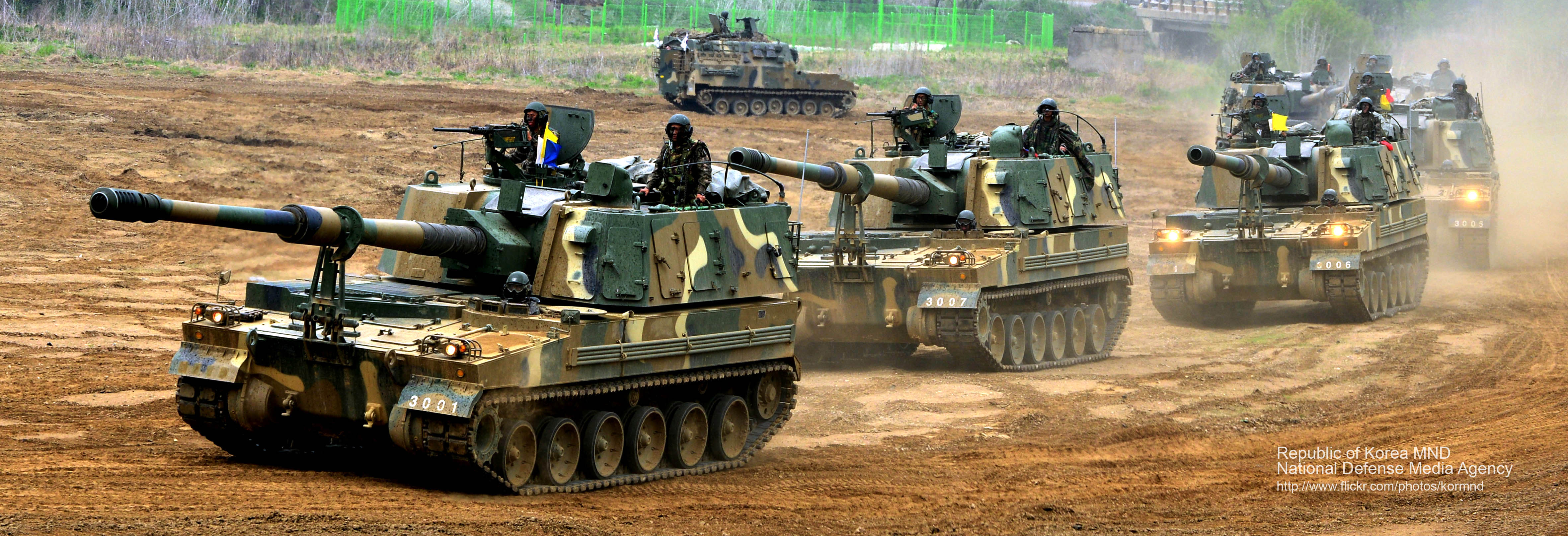 육군1포병여단 5710부대 K-9자주포들이 지난 10일 경기도 파주시 법원읍 직천리 훈련장에서 포대전술훈련 간 진지 변환을 위해 작전지역으로 고속 기동하고 있다. 부대는 이번 훈련을 통해 적의 기습도발에 즉각 대응사격 할 수 있는 능력을 점검, 확인했다. 촬영 - 박흥배 기자